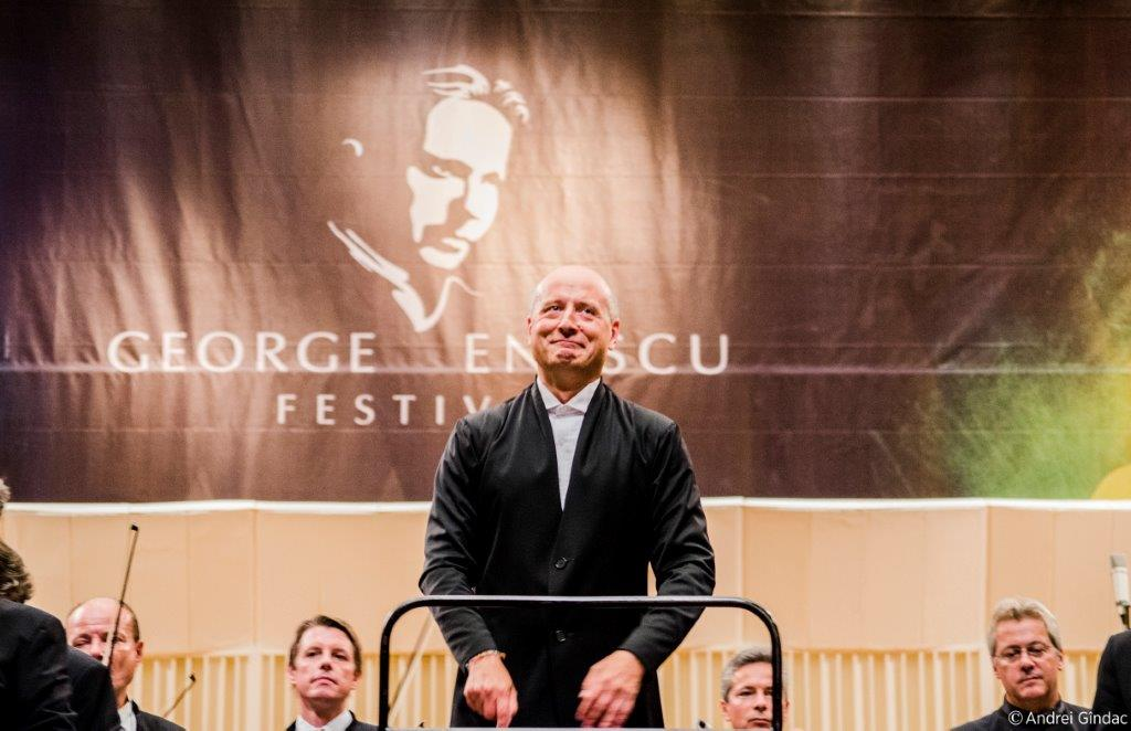 credit: Andrei Gîdac